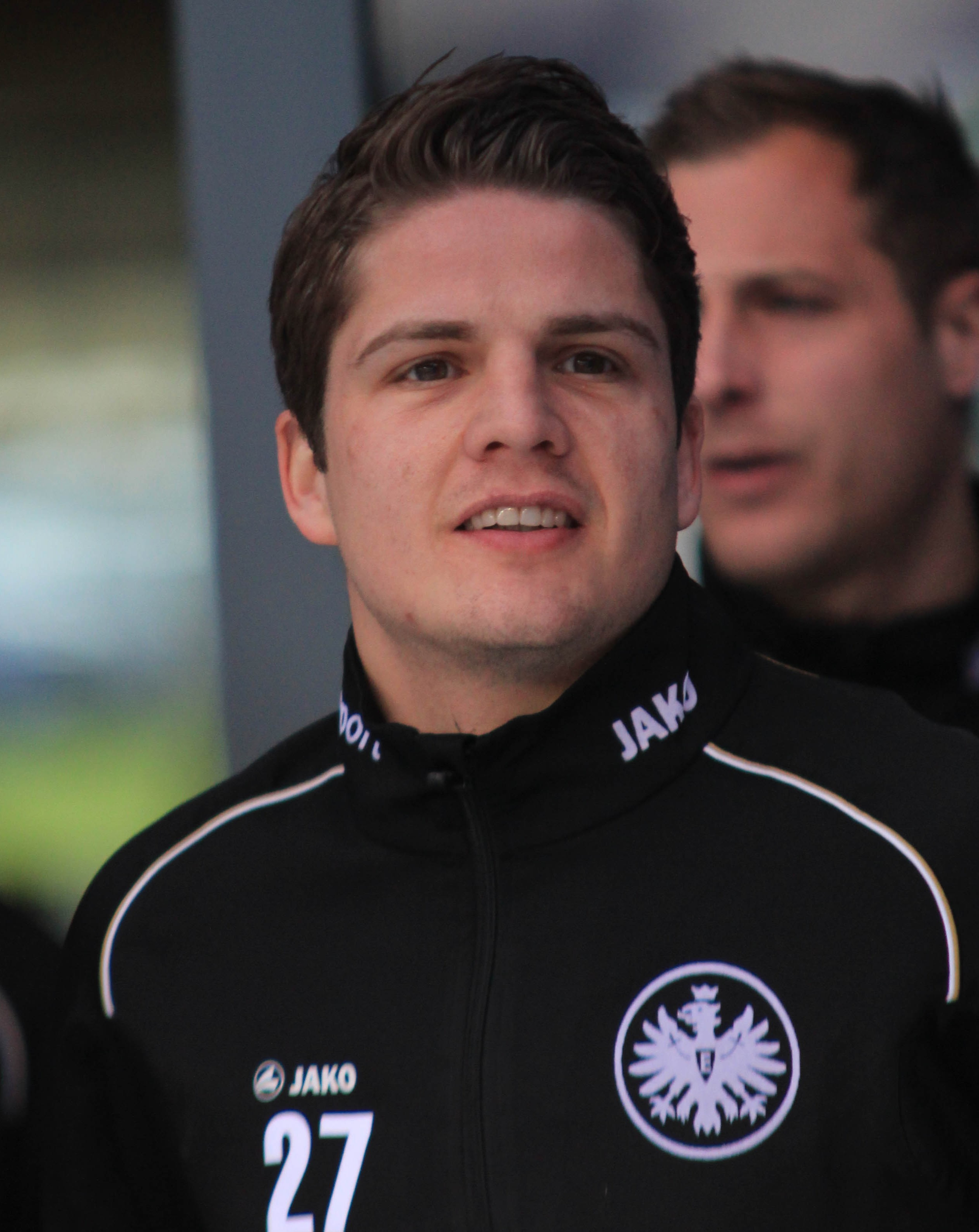 Swiss footballer Pirmin Schwegler, Eintracht Frankfurt